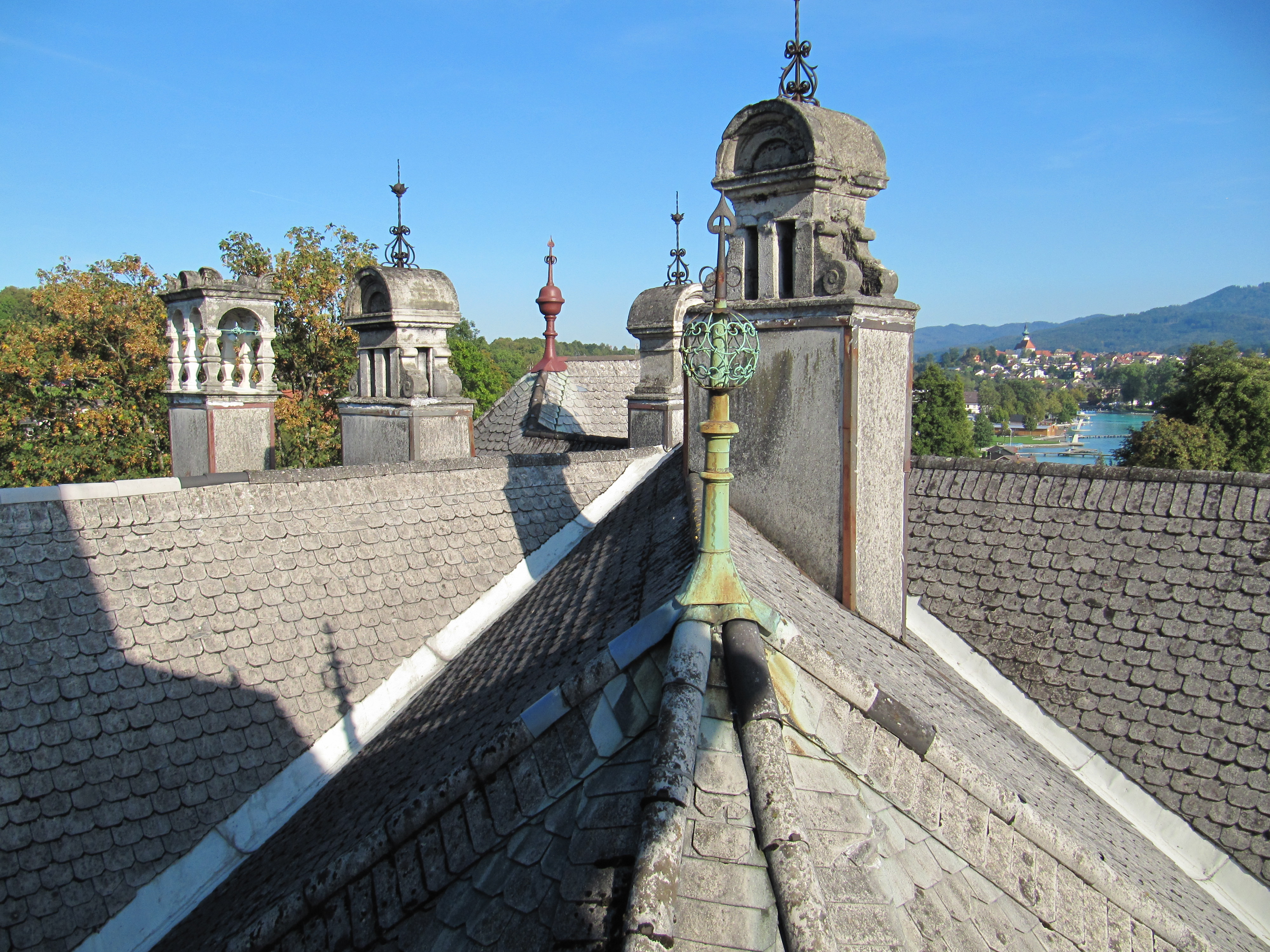 Unter anderem ist die Dachlandschaft der Villa Paulick mit den Kaminen und verschiedenen Dachreitern beachtenswert.